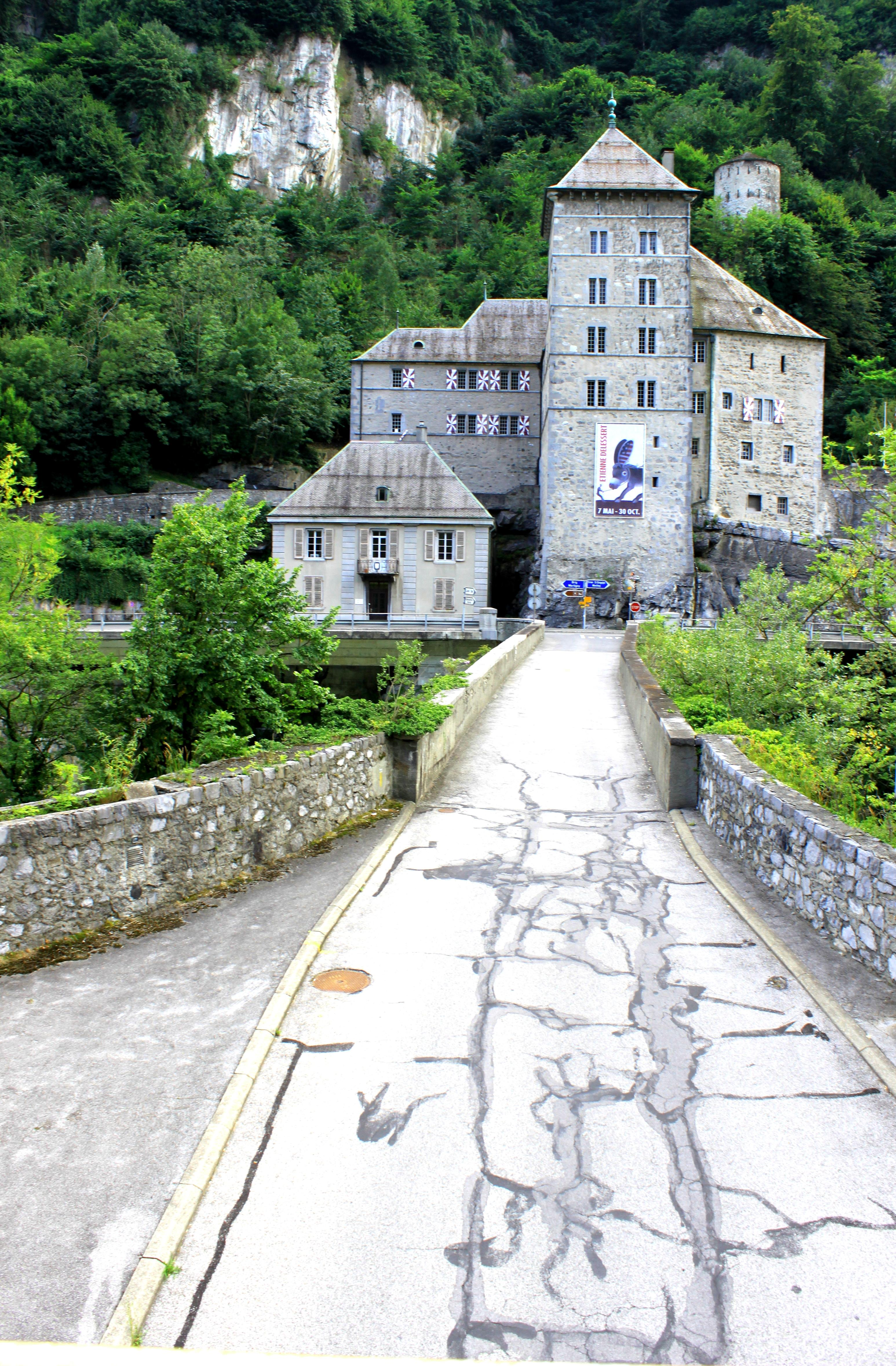 Suisse, canton du Valais, Saint-Maurice, Château.